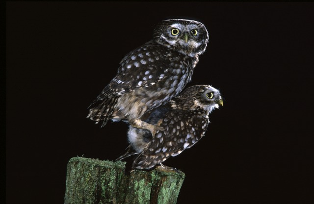 Kopulation Steinkauz